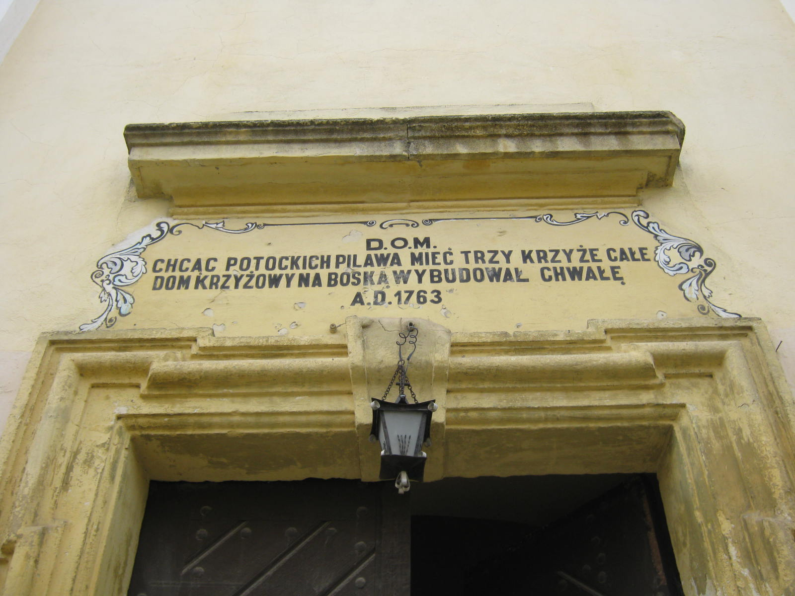 Сандрик і напис над входом до костелу Небовзяття (Внебовзяття), Бучач, жовтень 2013